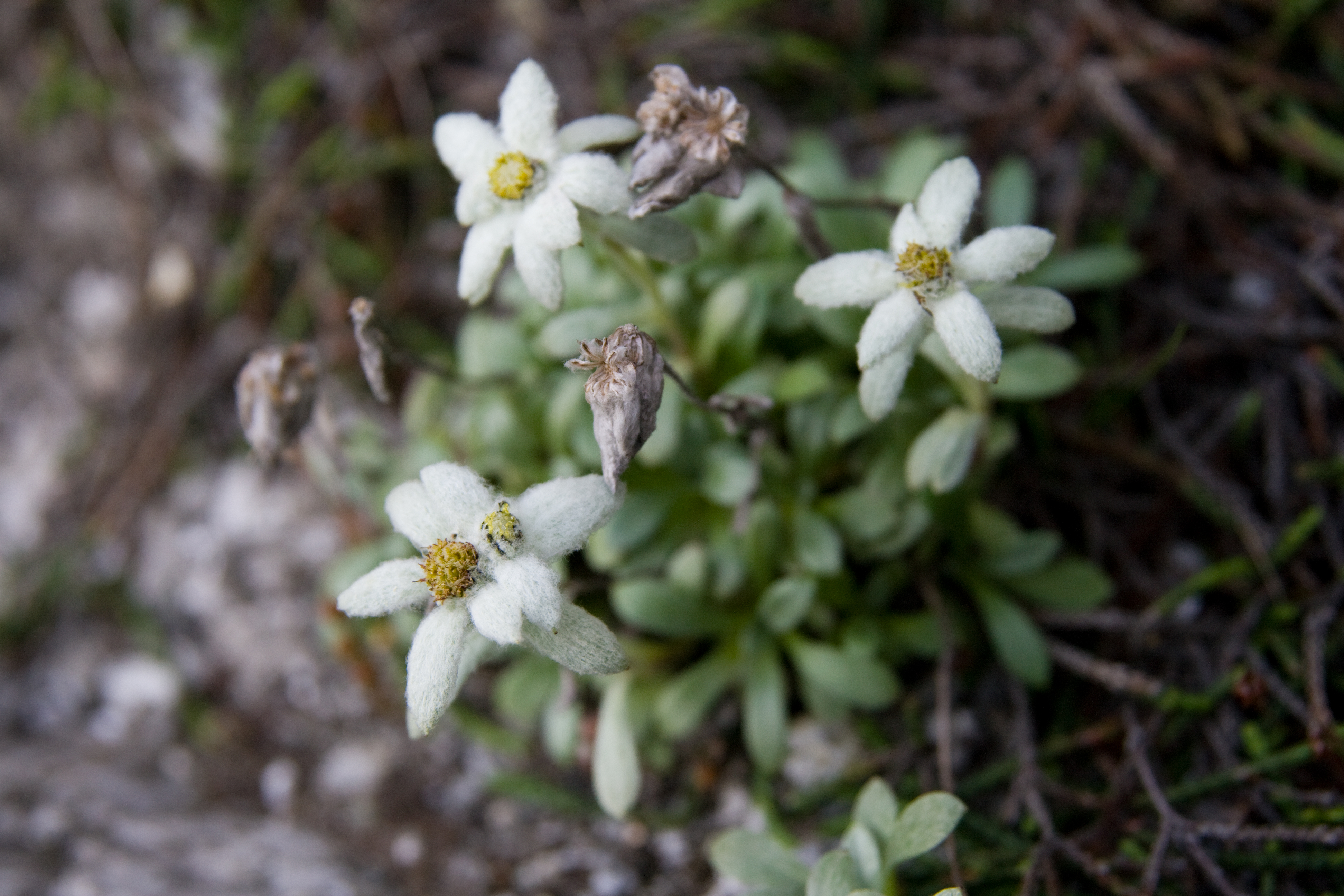 ヒメウスユキソウ (学名:Leontopodium shinanense)